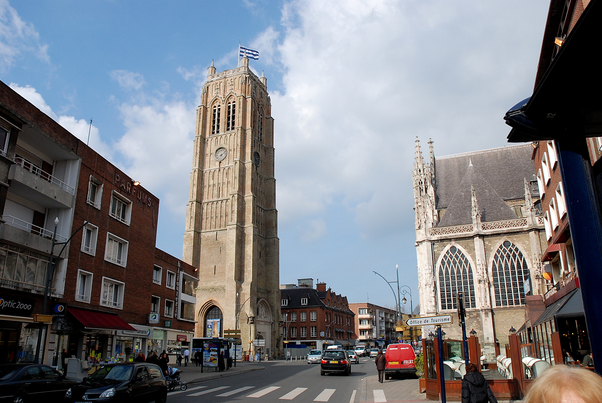 Beffroi, dans le temps clocher de l'église Saint Eloi à Dunkerque